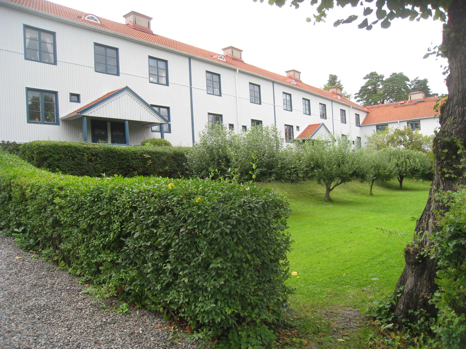 Bostadshus, ett flerfamiljshus, i kvarteret Bostadslotteriet vid Alviksvägen 70-80, Äppelviken, Bromma.